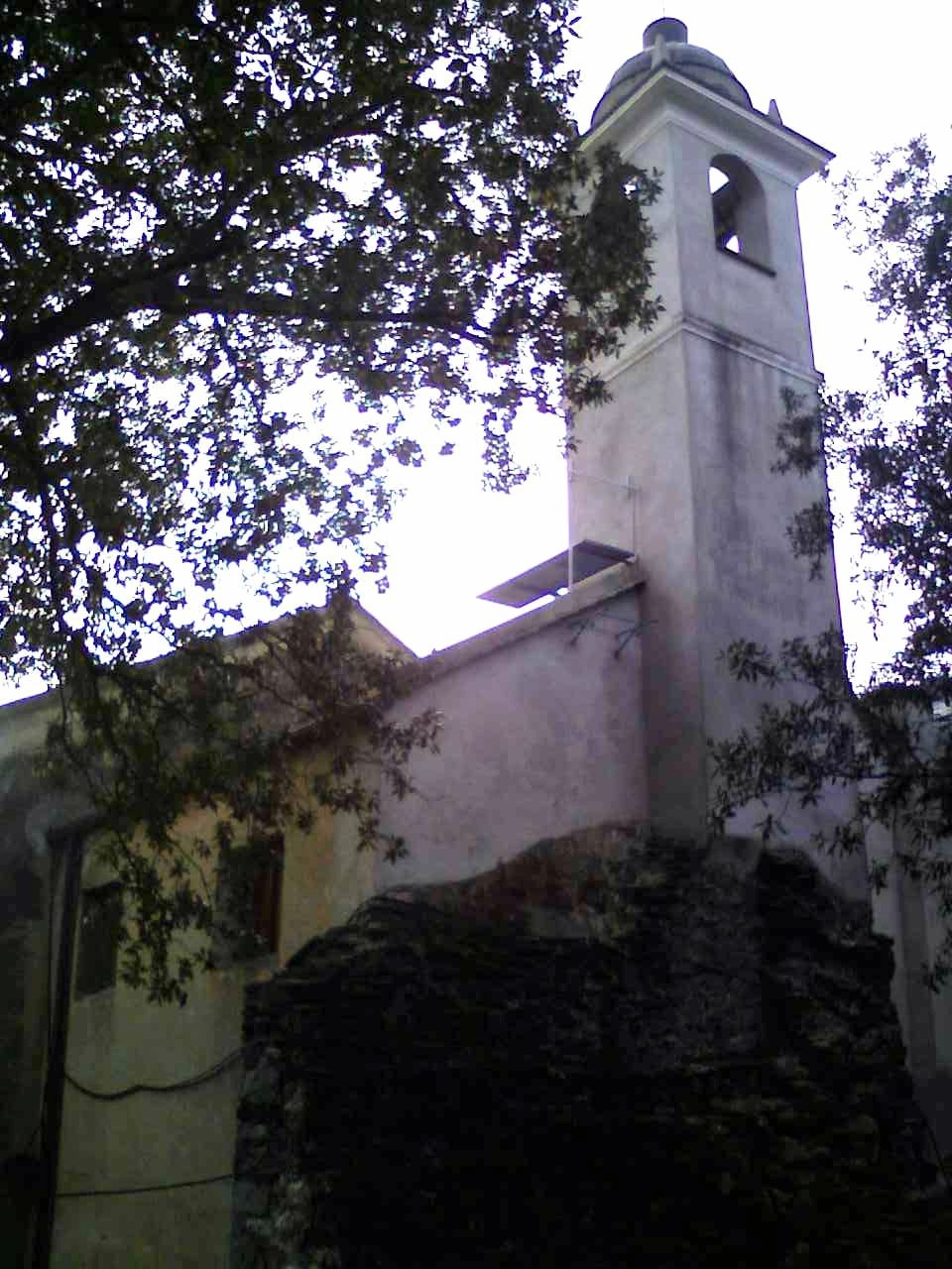 Campanile della chiesa di San Donato di Varazze (Italy)